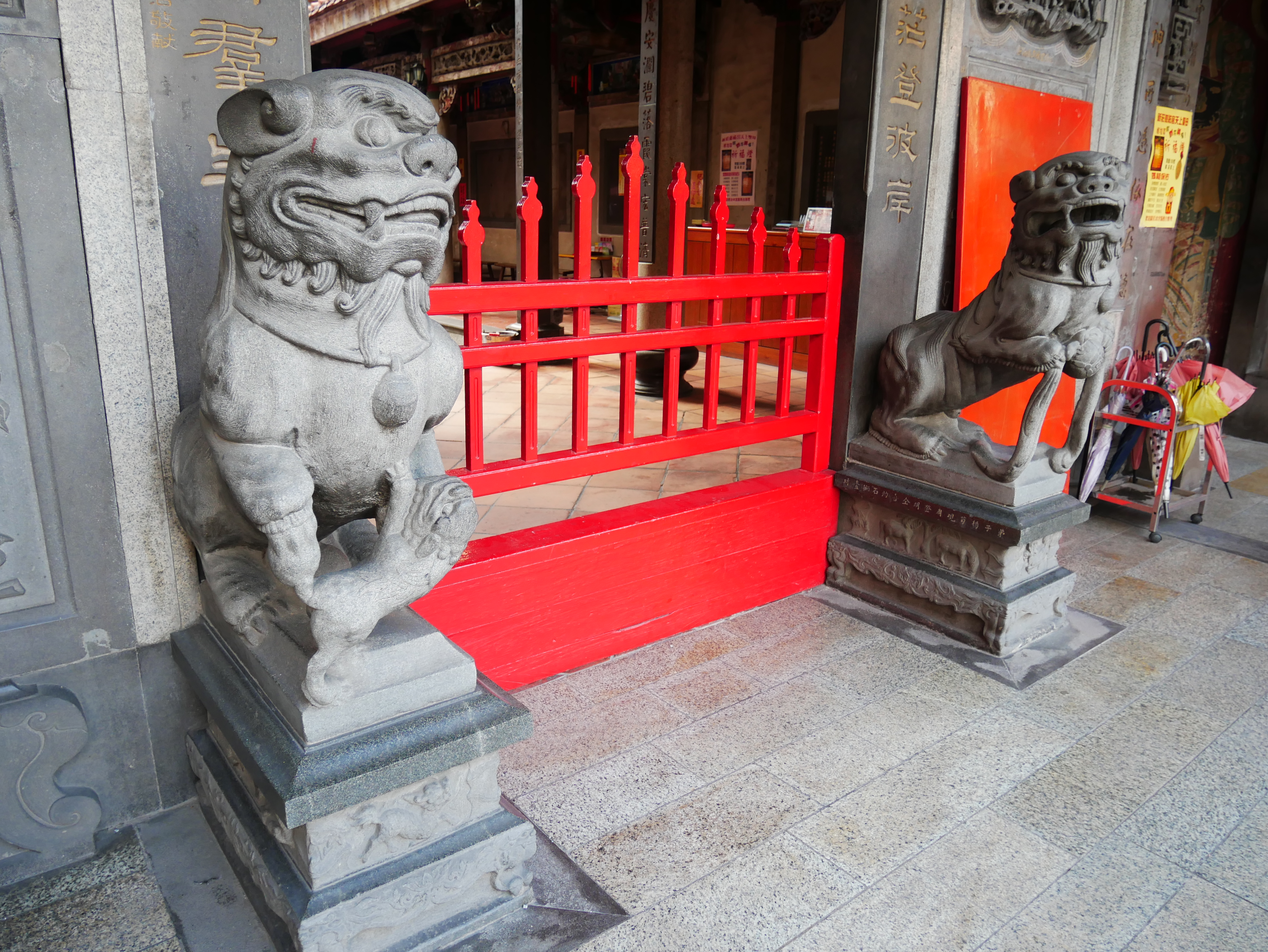 中文（台灣）: 新莊慈祐宮石獅，新北市新莊區榮和里